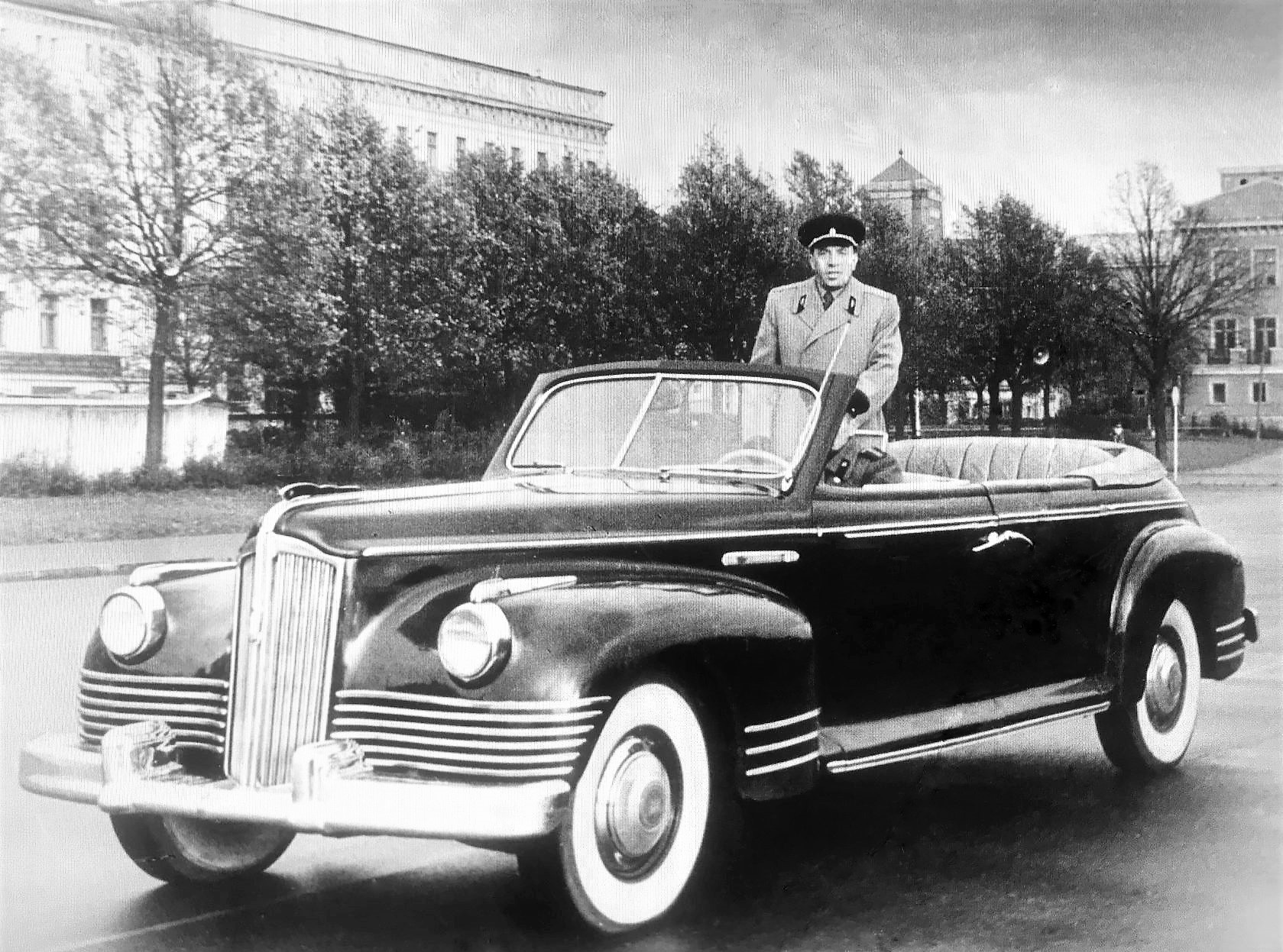 Заместитель командующего войскам Прибалтийского военного округа генерал-лейтенант И. И. Гусаковский принимает военный парад в Риге